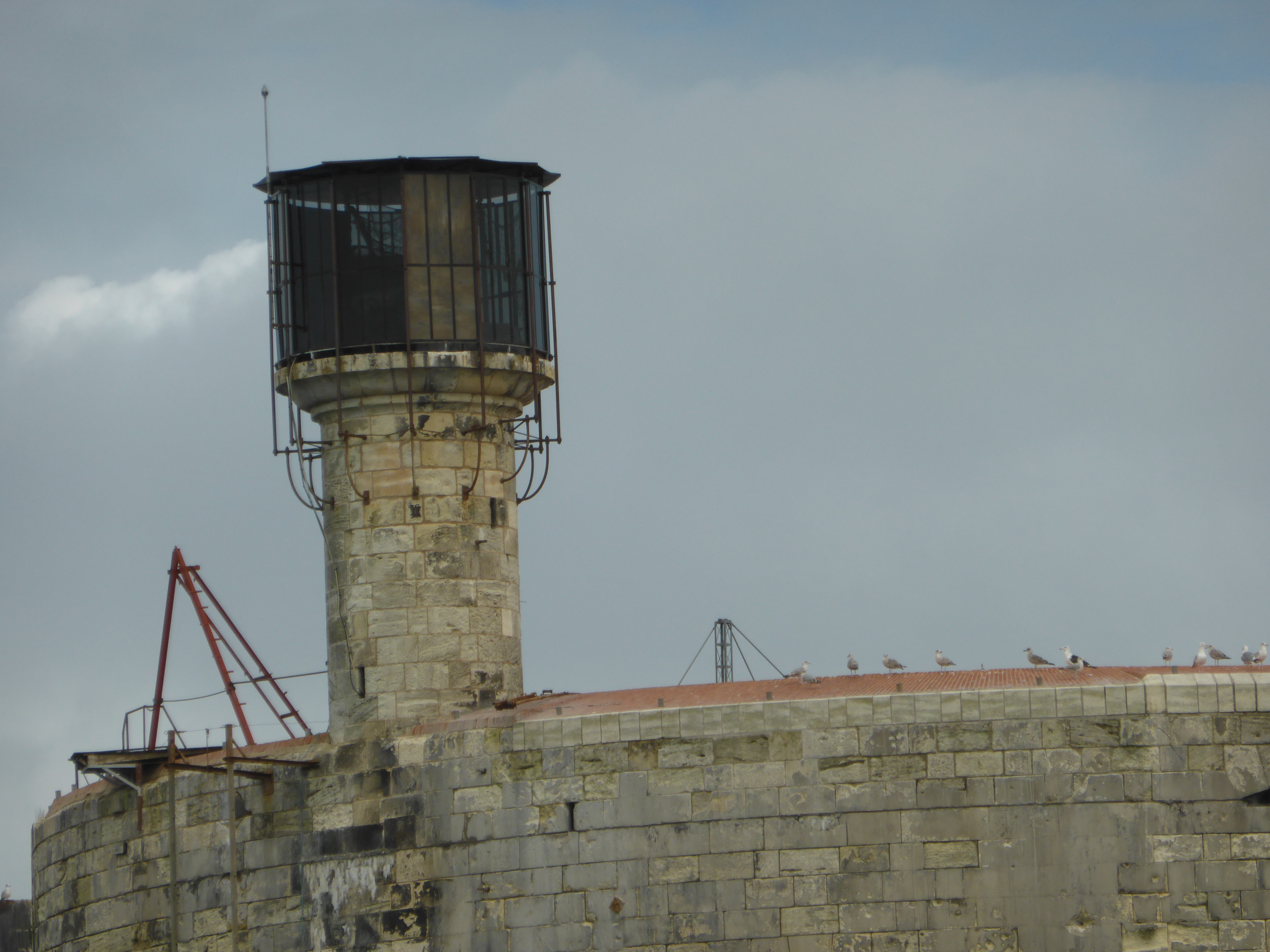 Vigie du Fort Boyard .